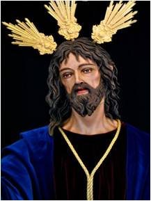 Imagen de Nuestro Padre Jesús del Amor, que procesiona el Domingo de Ramos en Madrid